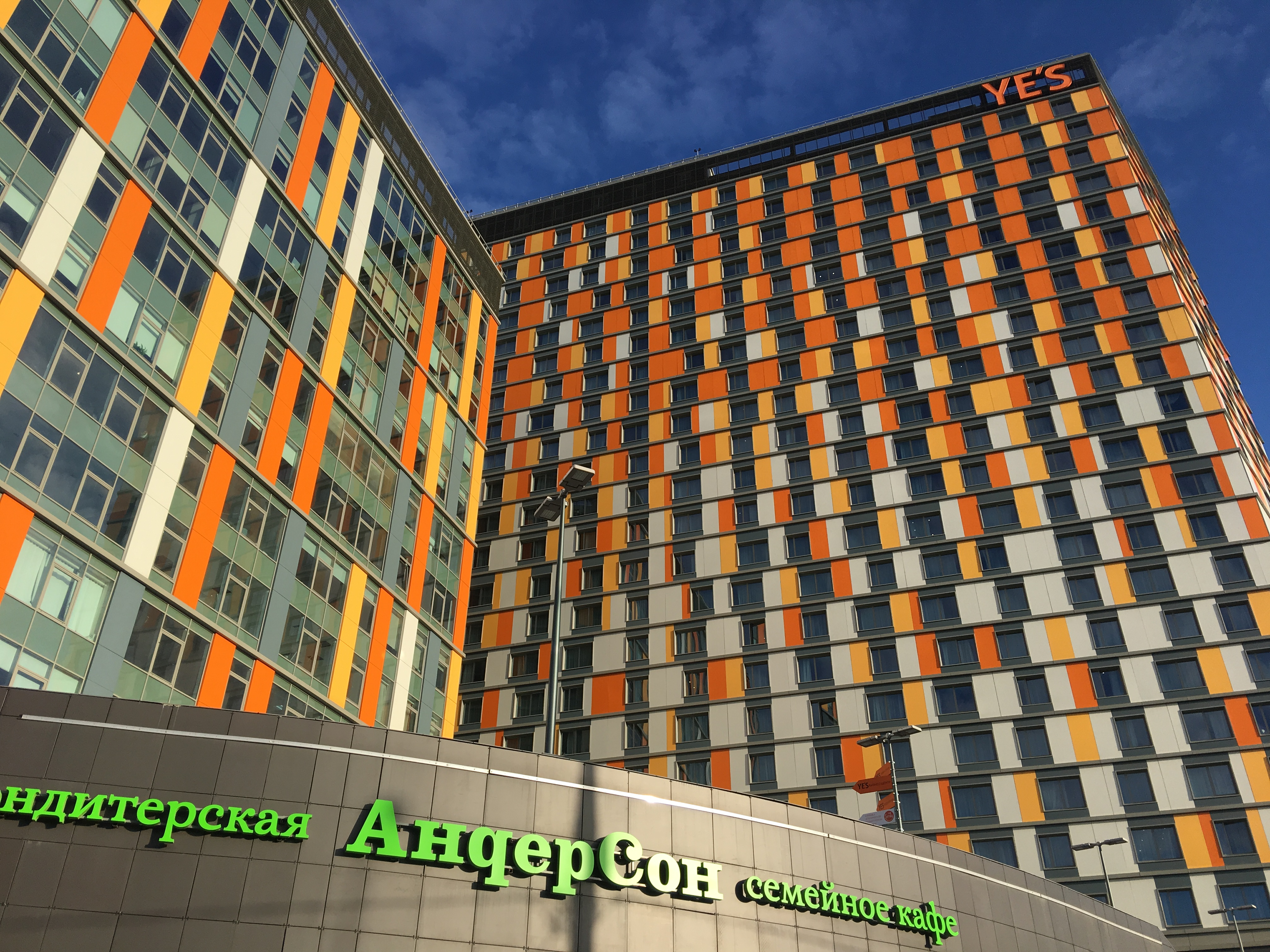 Фасад из алюминиевых композитных панелей